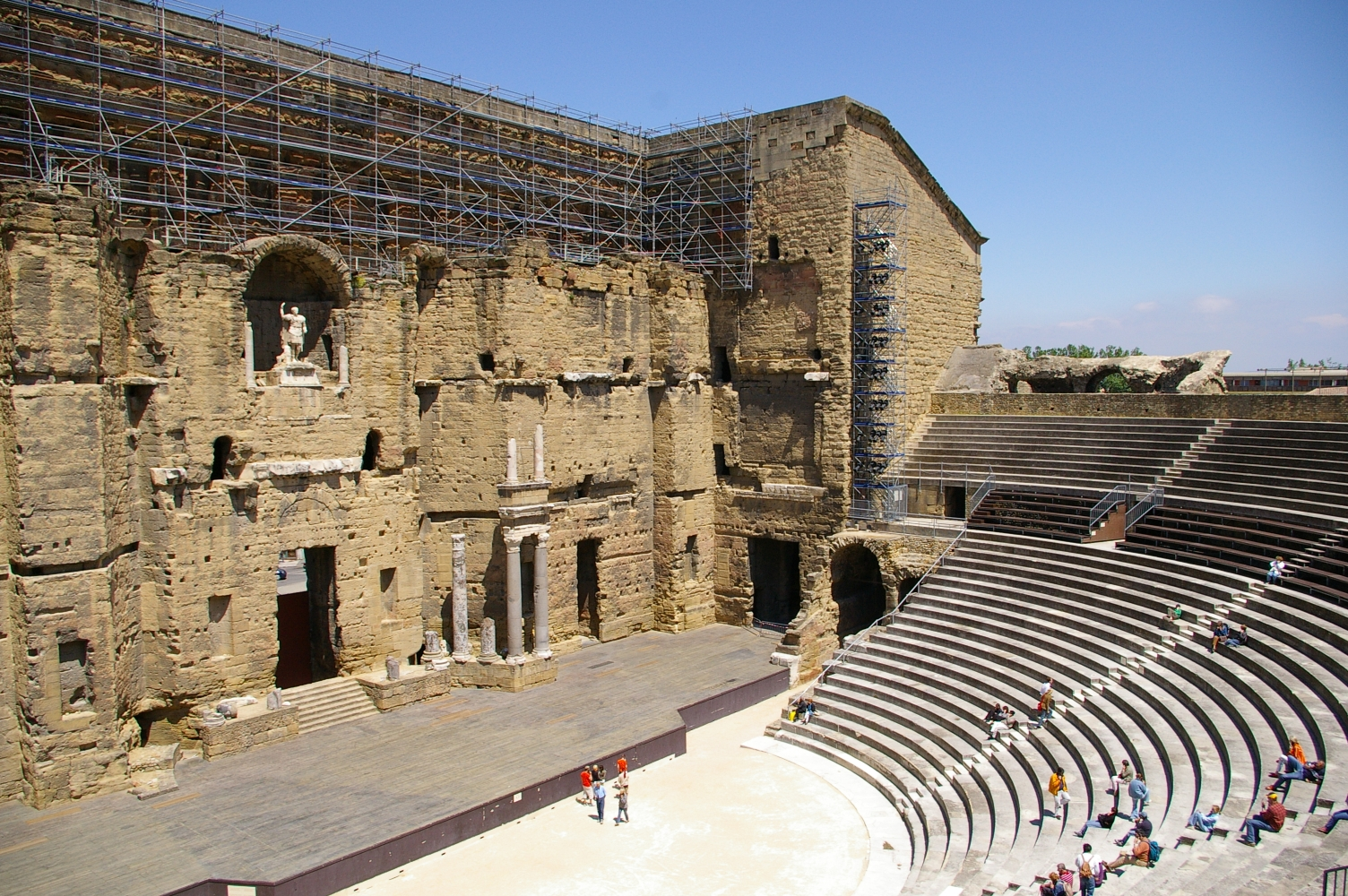 Das sehr gut erhaltene römische Theater in Orange.